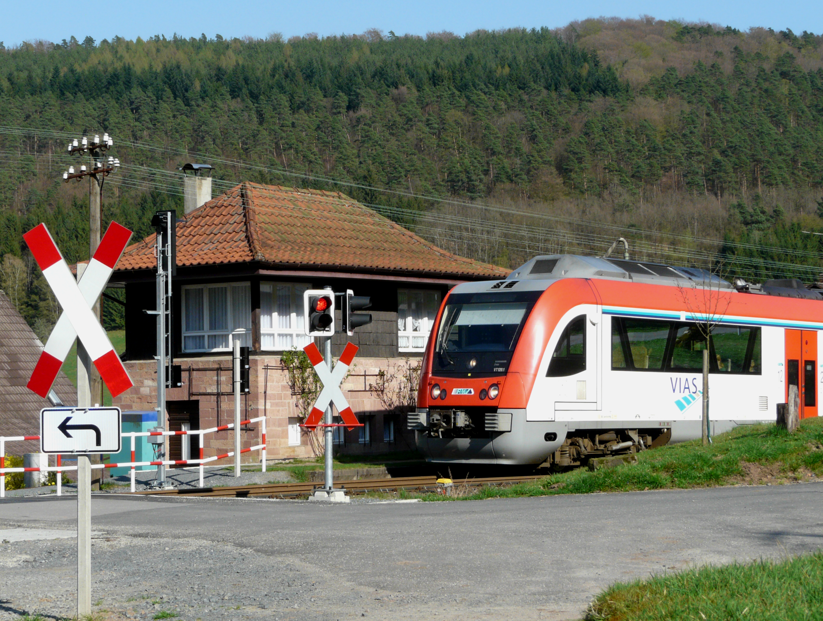 Odenwaldbahn am Haltepunkt Hesseneck Schöllenbach